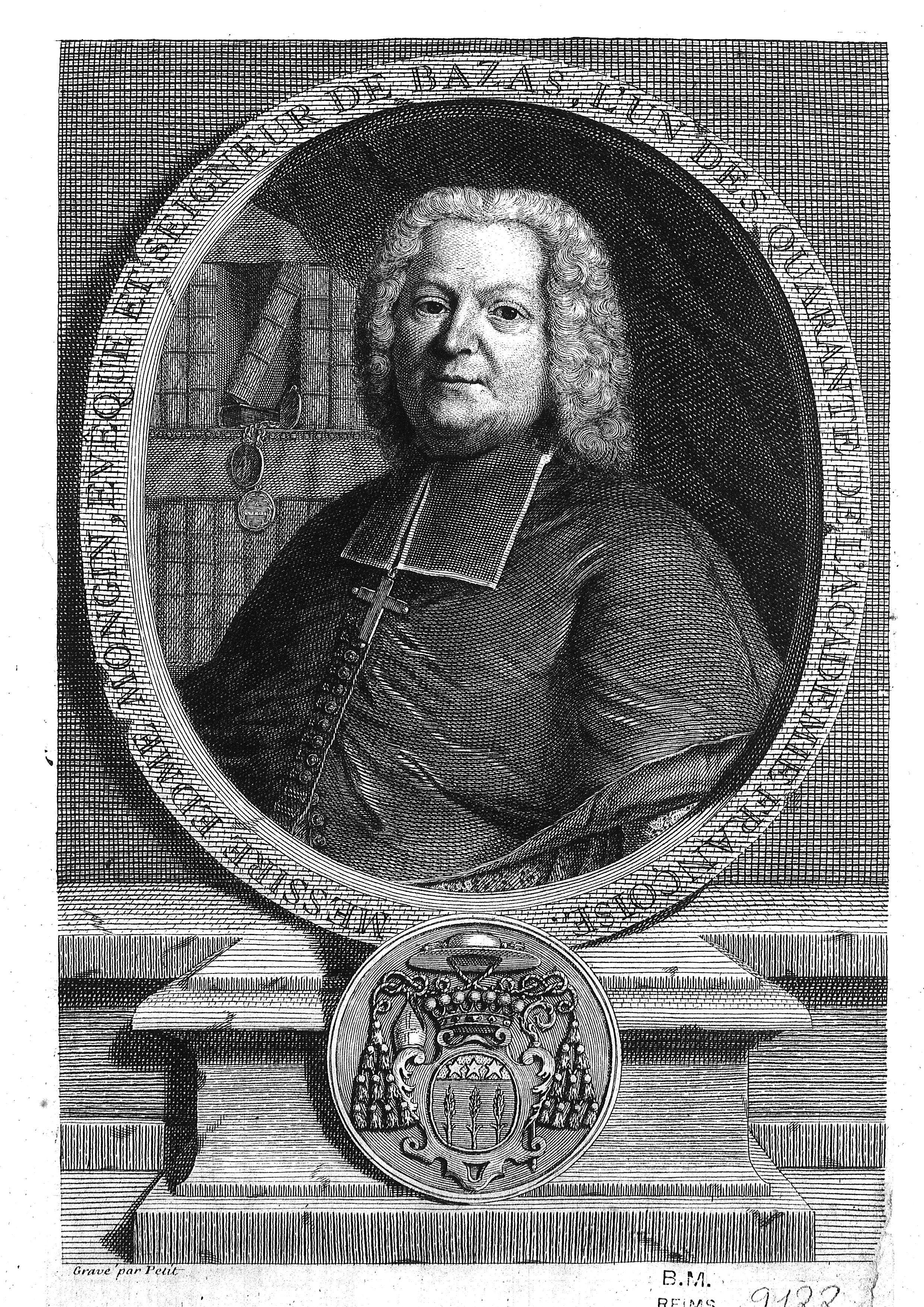 de la bilbiothèque municiaple de Reims.